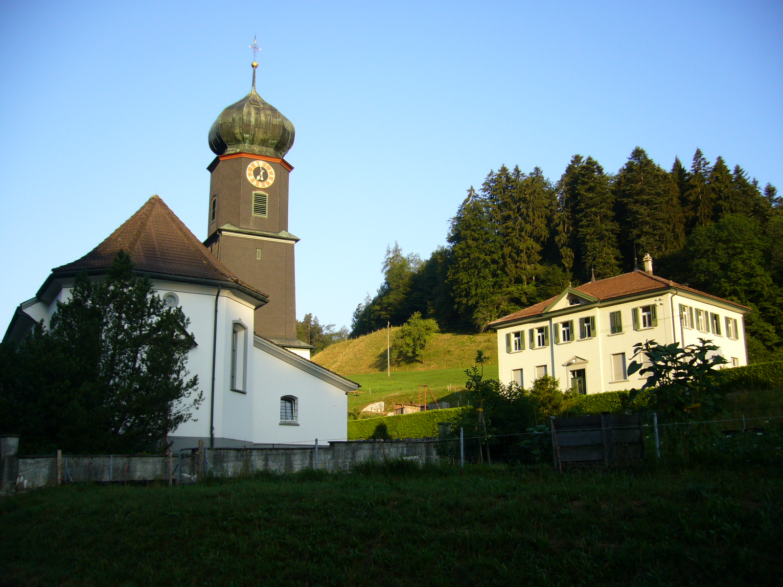 Kapelle Au in Fischingen, Kanton Thurgau. Fotografiert von Peter Berger, 23. Juli 2006.